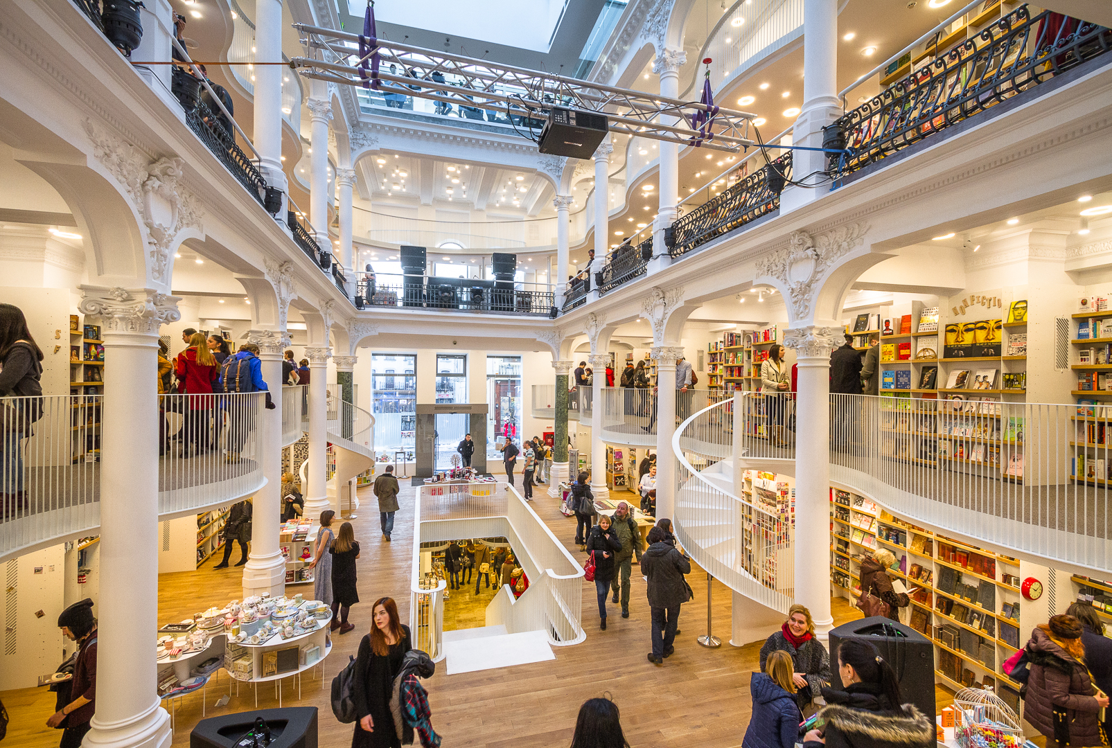 Libraria Carturesti Carusel - Interior ziua